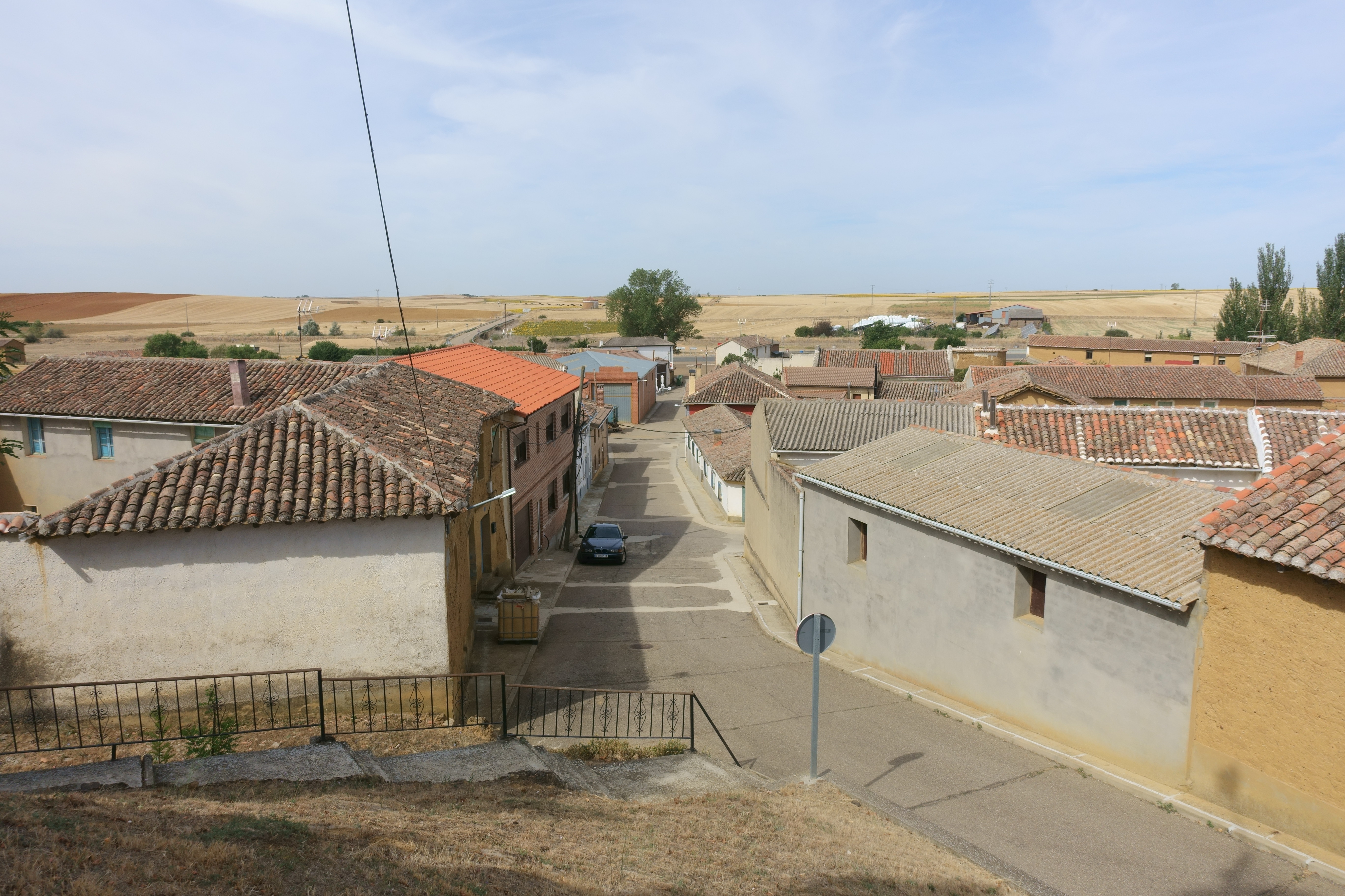 Vista parcial de Ledigos (Palencia, España), desde la iglesia de Santiago Apóstol.